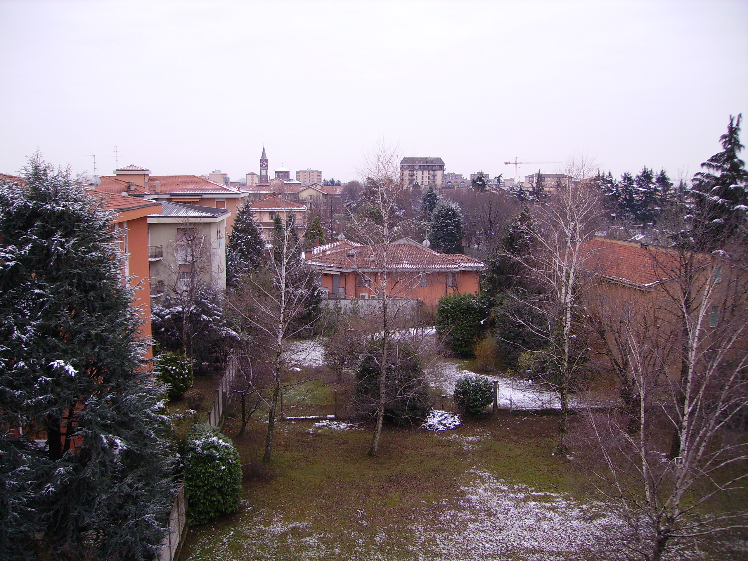 Vista di Muggiò dalla zona nord